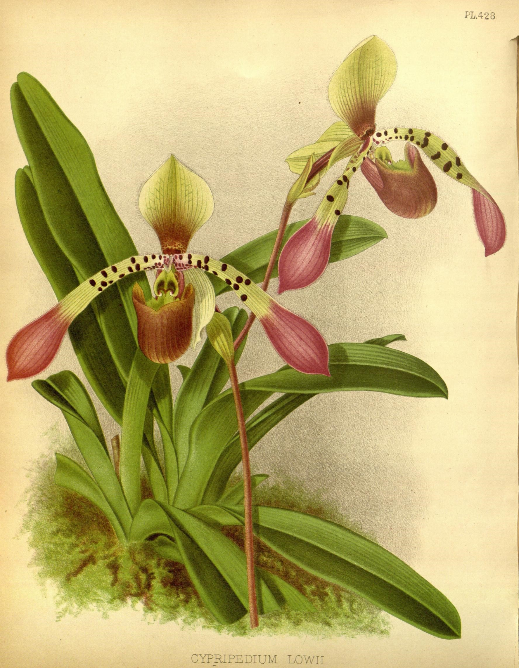 PL.428 /^ f. \ . / m ^$^ r t i % ■I 1 I •I '"%;, ■'="», '. .._ ?!%V ^■ ^' '^r- r -■. ^iS^- r L V , ^. -,.^' 4 y^ ■^il -.^ t:: V T6- " ■ ^0^ ^ v.* 'iB V \ CYPRIPEDIUM LOWII.